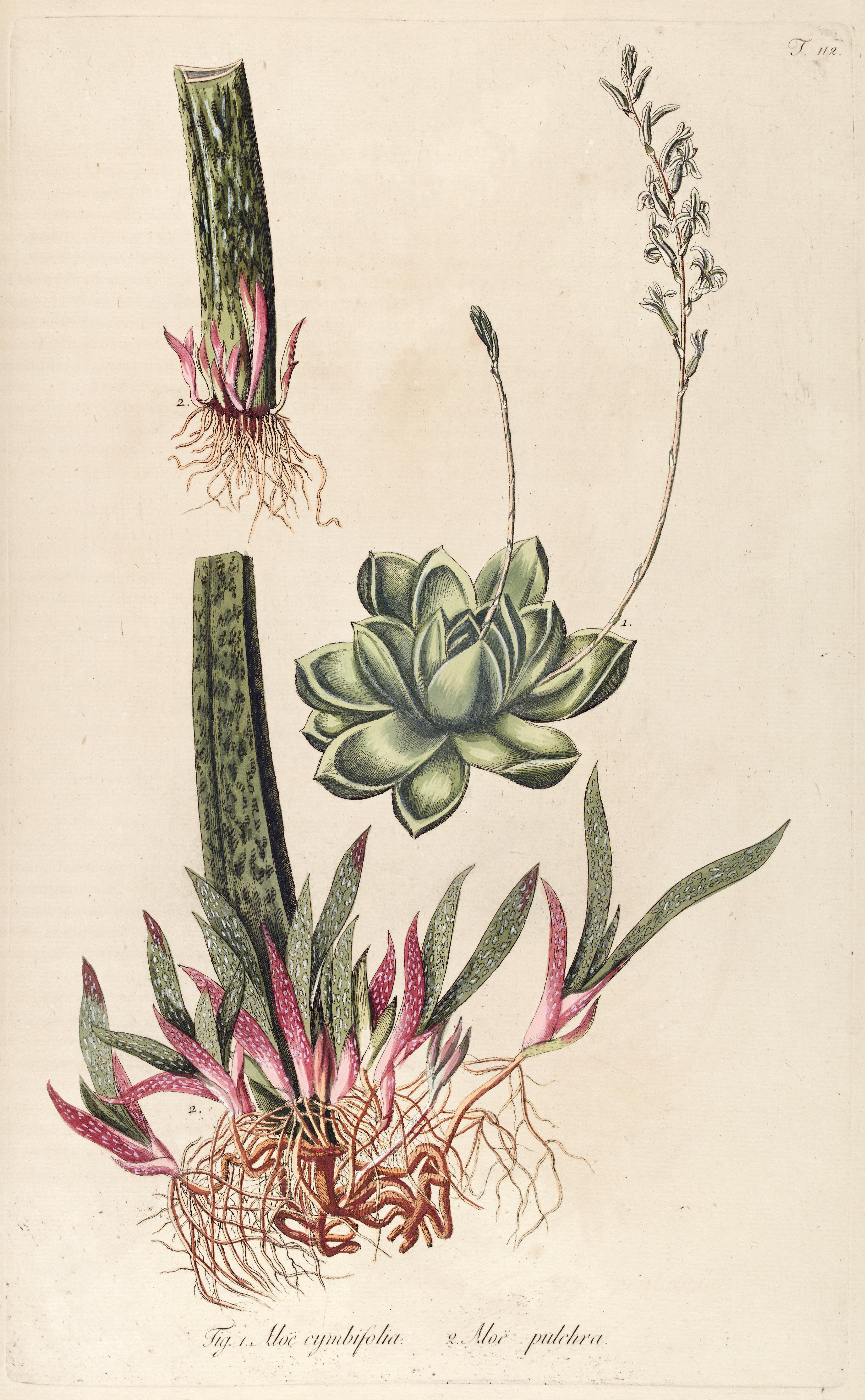 Fragmenta botanica, figuris coloratis illustrata :ab anno 1800 ad annum 1809 per sex fasciculos edita /opera et sumptibus Nicolai Josephi Jacquin.